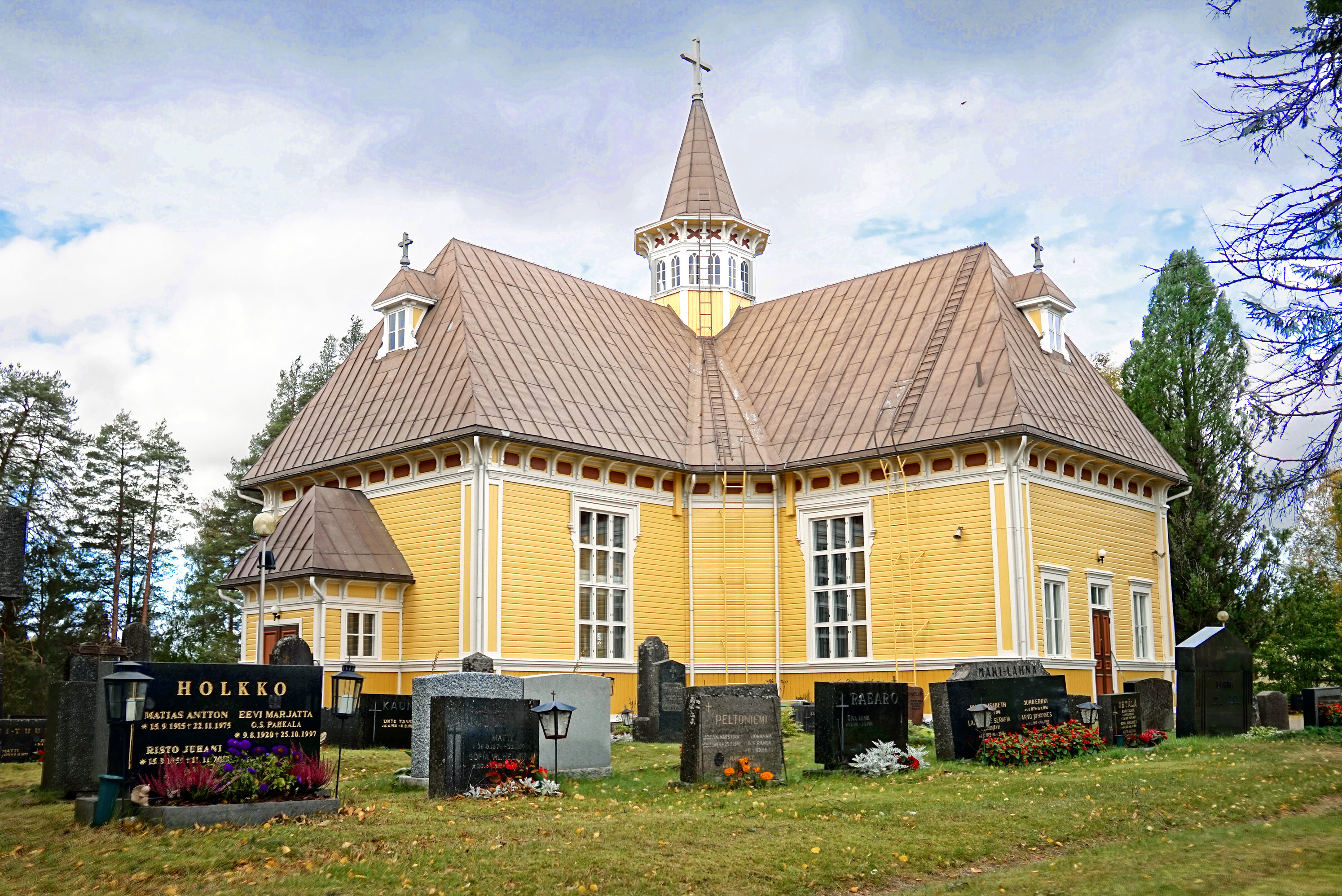 Töysän kirkko